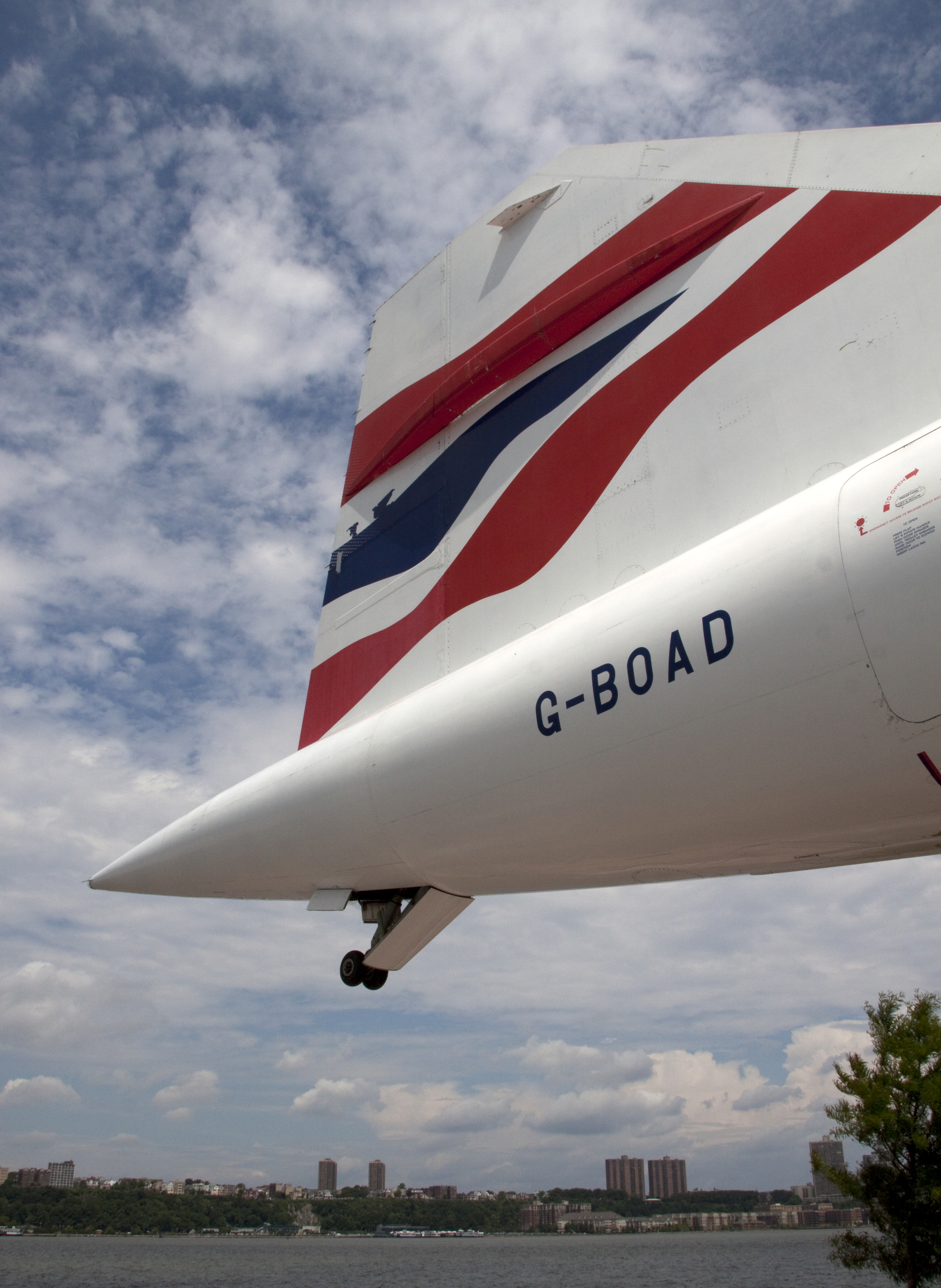 Concorde Tailplane 2